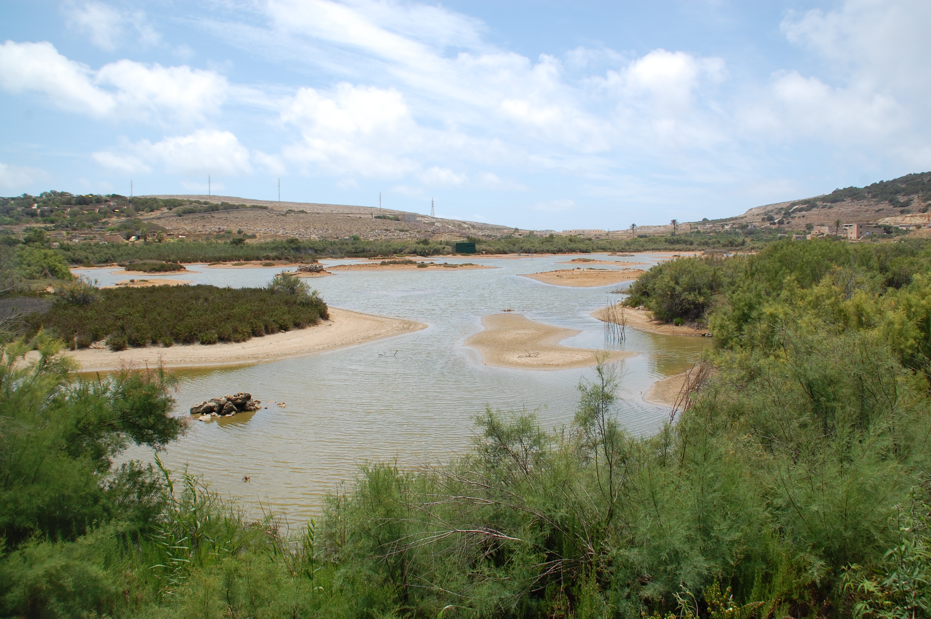 Salzmarschen des Ghadira Nature Reserve, Malta